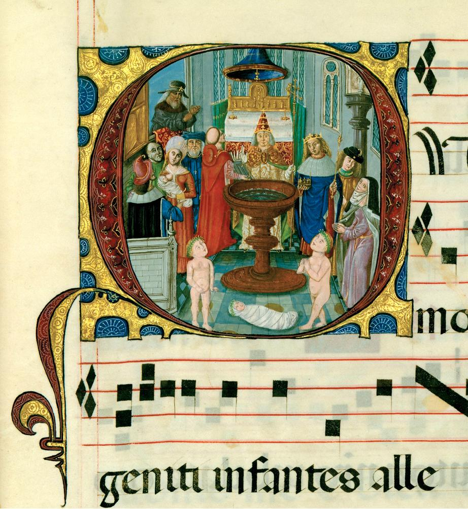 Corvina_kódex_Graduale miniatúrája. Q iniciálé - Keresztelés jelenet Cod. Lat. 424 Graduale. Pars II. 1480-1488 között. Buda? Franciaország?, Pergamen.